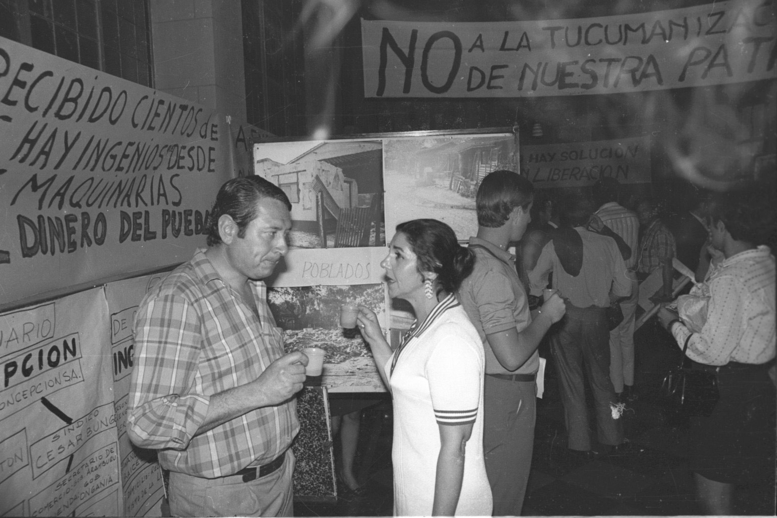 Fotografía de "Tucumán Arde" en la sede de la CGT de los Argentinos Regional Rosario 1968, noviembre Vista parcial de la muestra donde se pueden apreciar fotos, pancartas, un diagrama, pasacalles y parte del público. En primer plano se observan dos personas dialogando y tomando café. El mismo era servido durante la muestra unicamente amargo (la falta de azúcar hacía referencia al problema tucumano). Se trataba de otro dispositivo de sensibilización a través de los sentidos (afectar el gusto y no sólo la vista). Asimismo, la luz se interrumpía cada tantos minutos en referencia a la muerte de un niño en Tucumán por las difíciles condiciones de vida. Fotografía de Carlos Militello Fotografía Derecho de uso: Graciela Carnevale Lugar: Rosario, Argentina Palabras clave: Tucumán Arde inauguración CGT de los Argentinos azúcar pasacalles diagrama fotografía Colección: Tucumán Arde (1968)